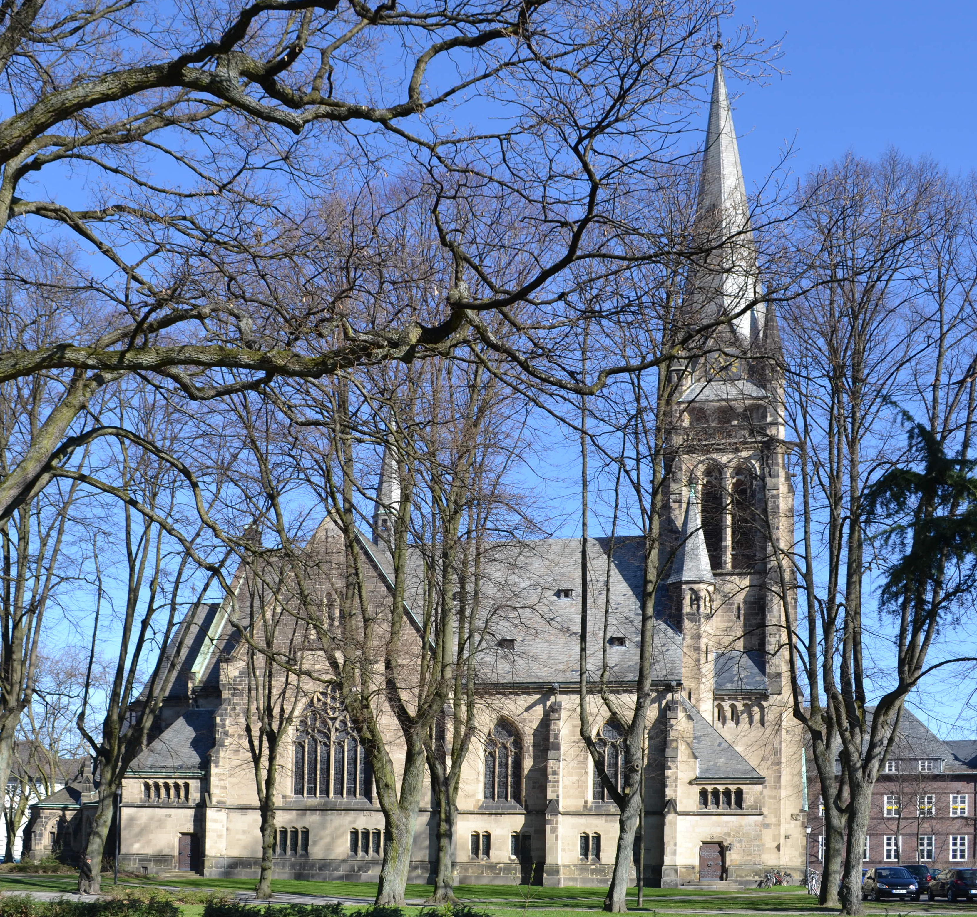 Baudenkmal Detmold Nr. 15 - Christus-Kirche Kaiser-Wilhelm-Platz